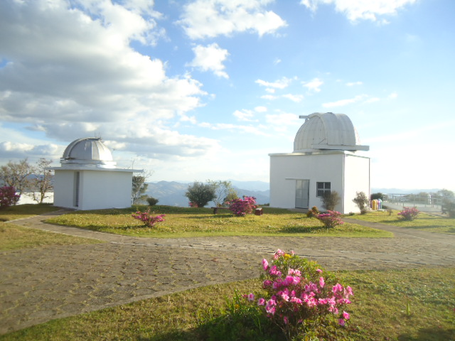 Vista do observatório